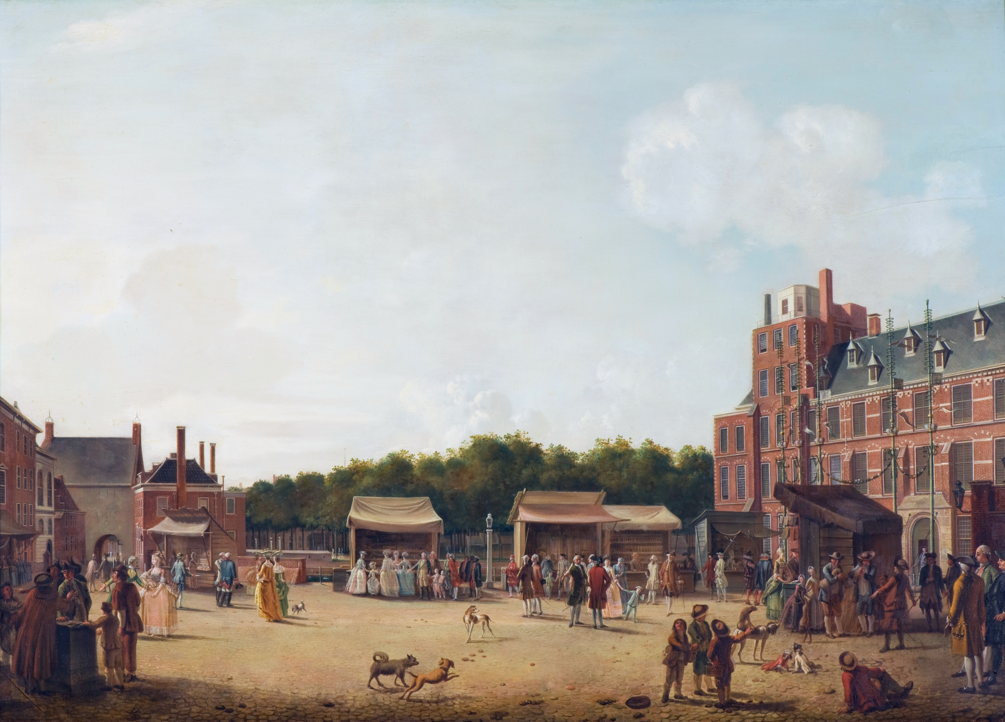 Het Buitenhof tijdens de Haagse kermis gezien naar de Gevangenpoort, met Stadhouder Willem V en zijn familie.